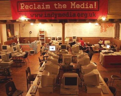 Indy-Center in Edinburgh während des G8. Während vieler Großereignisse werden von Aktiven aus aller Welt solche Medienzentren aufgebaut, die für alle offen sind.